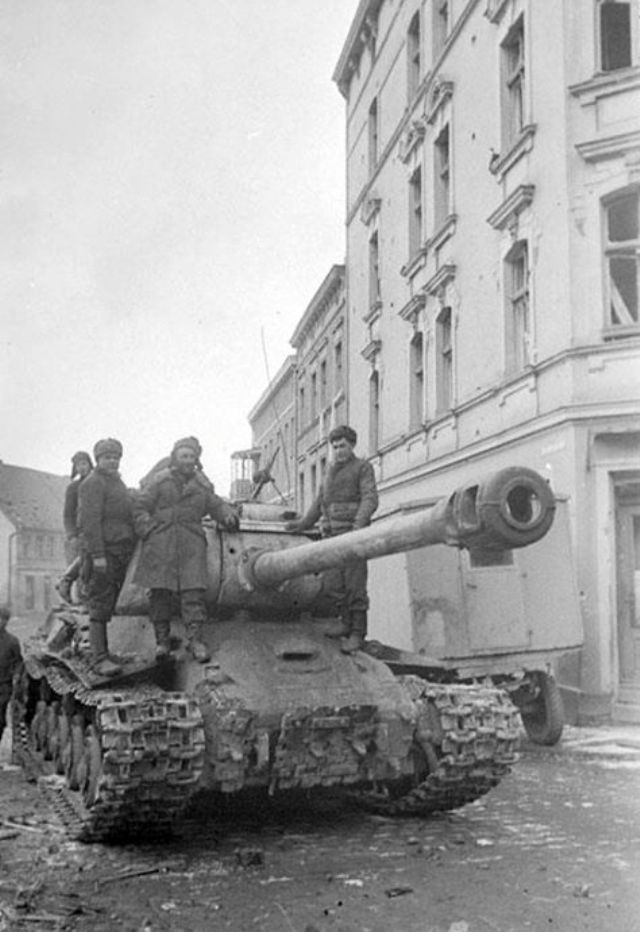 Starogród (Stargard) 19.03.1945 r.Radziecki czołg IS-2 na ul. Chrobrego, przy istniejących do dziś zabudowaniach.